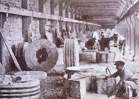 meules